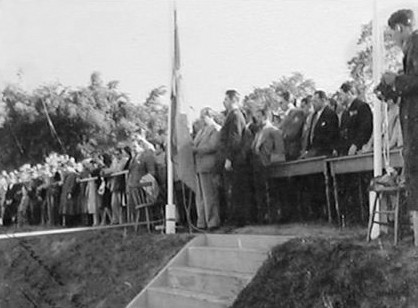 Fotografia da inauguração do Estádio 10 de maio, em 1942